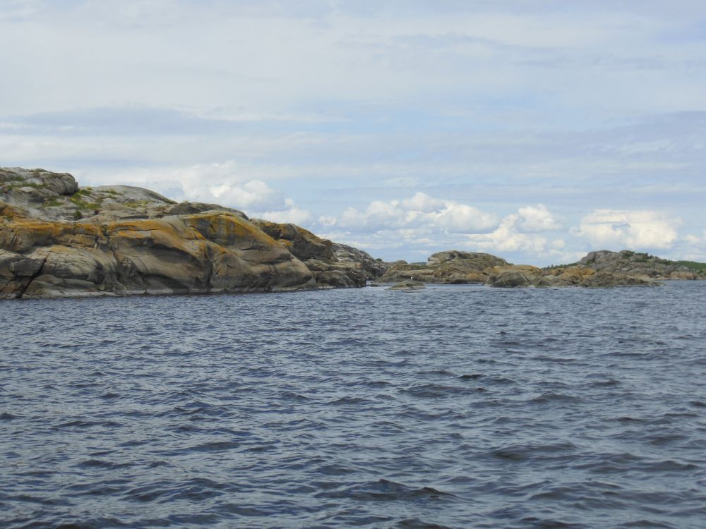 Langskjærene er en stabil hekkeplass for teist.